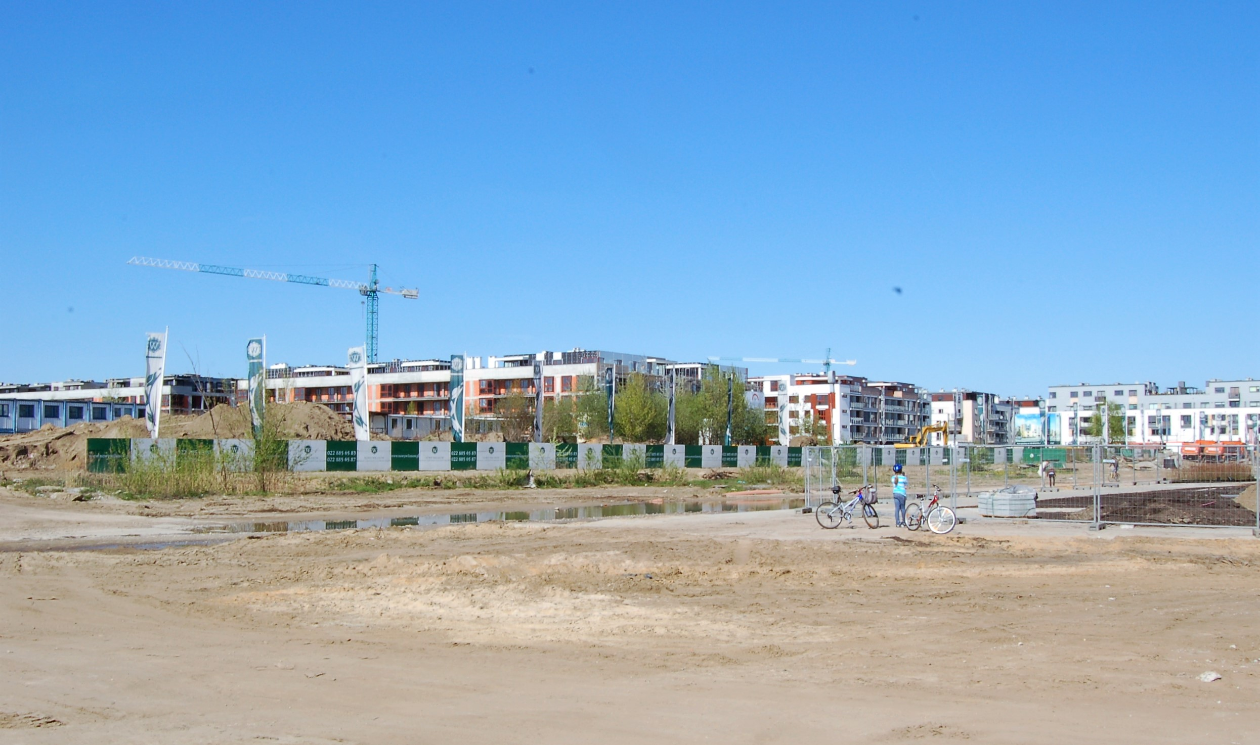 construction site